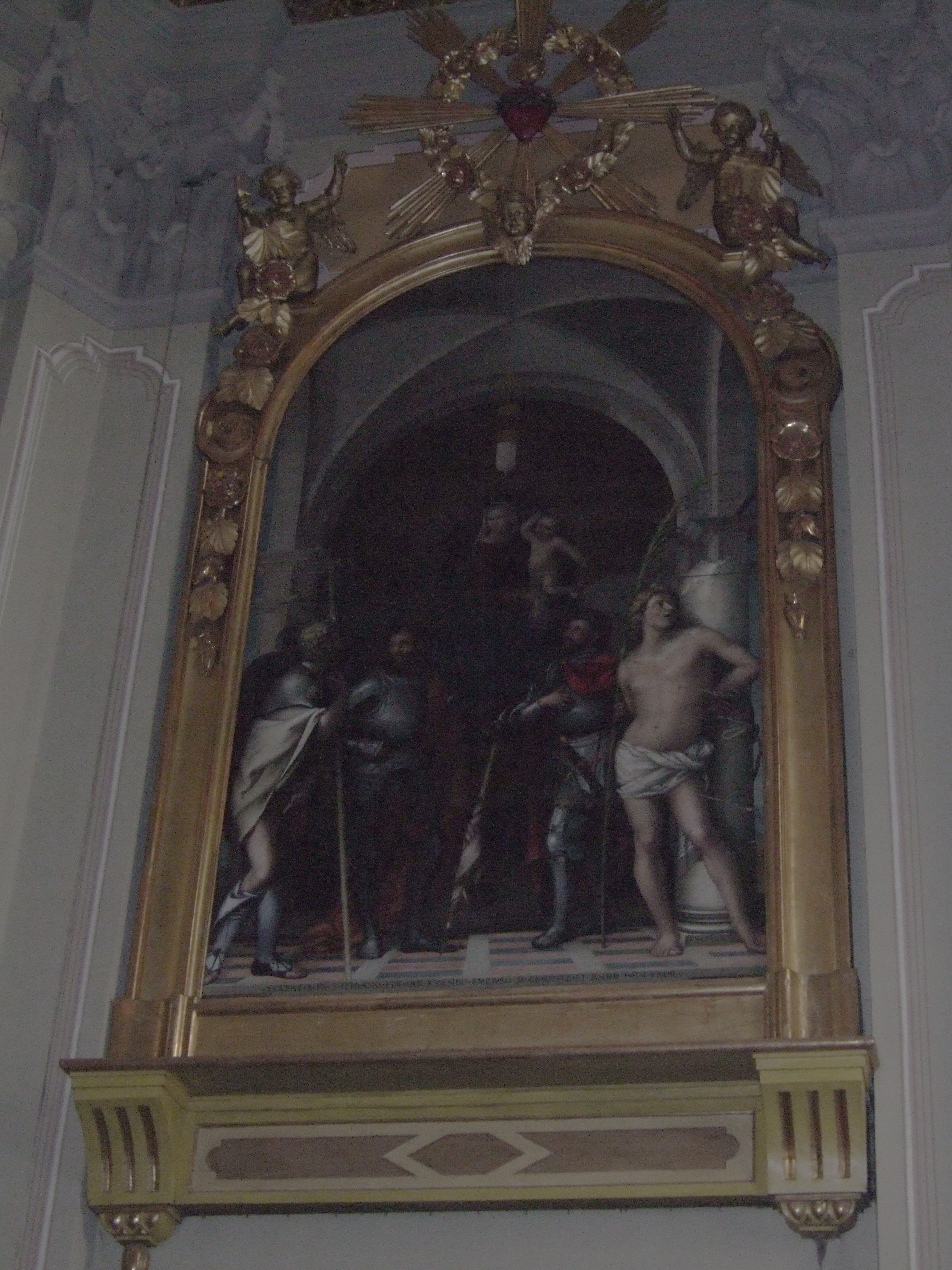 Udine - Chiesa delle Grazie Luca Monverde - Madonna in trono con Bambino e Santi